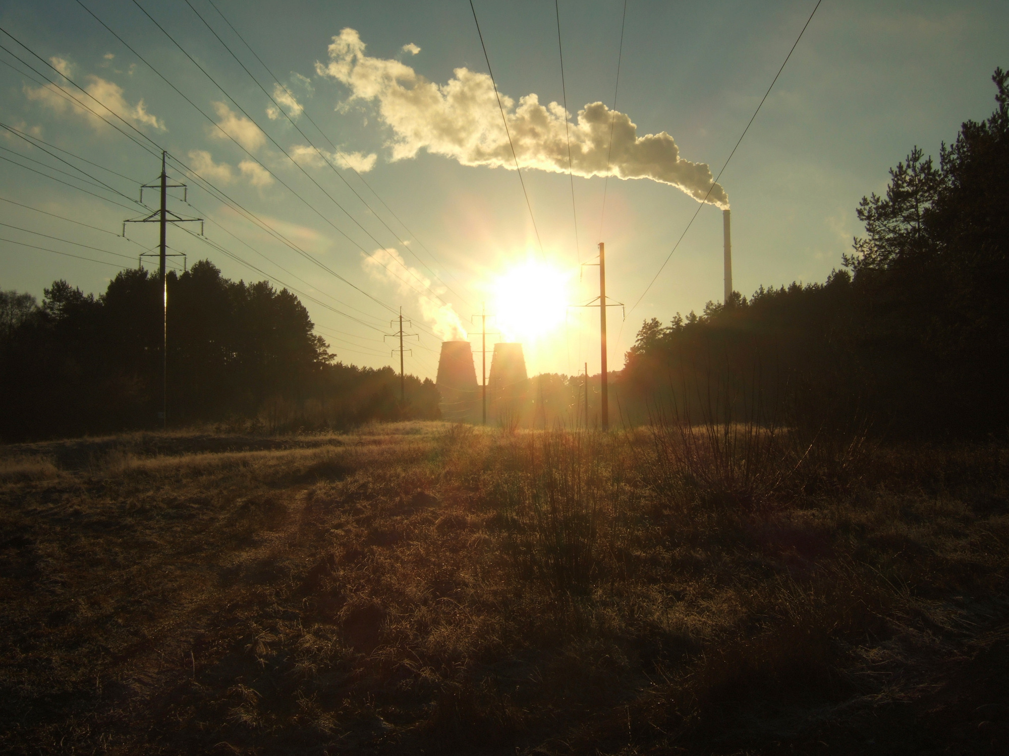 Vilniaus elektrinė-3